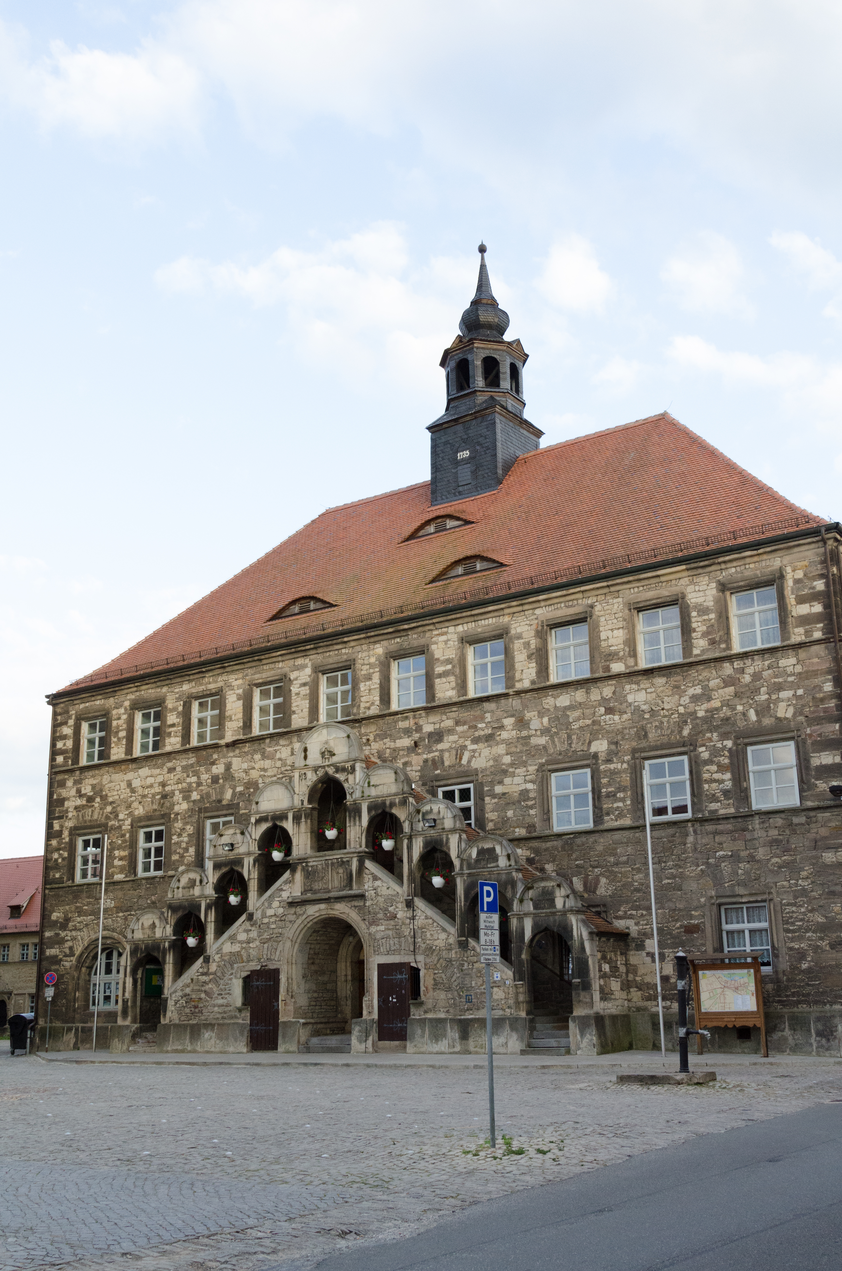 Laucha an der Unstrut, Markt 1, Rathaus